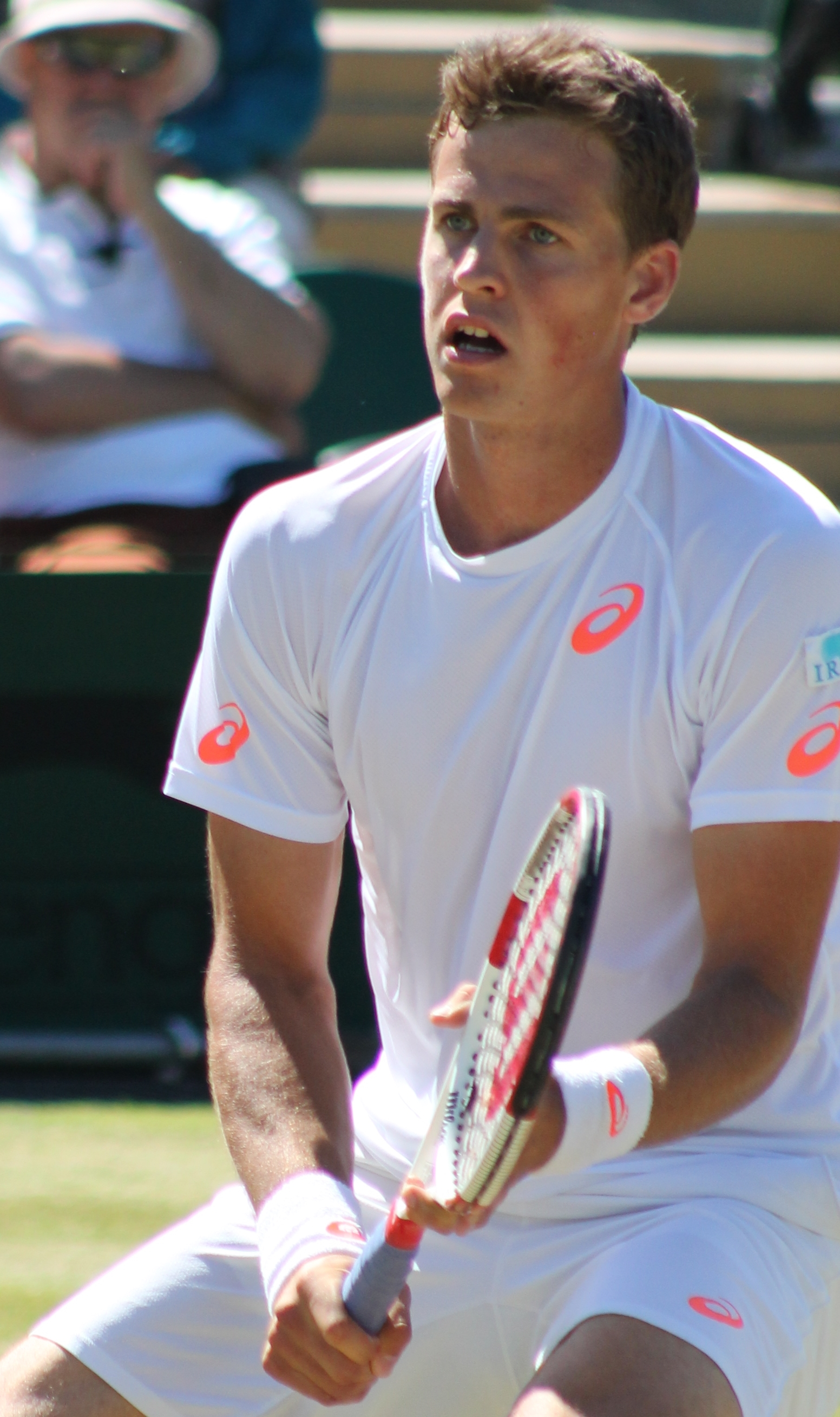 Pospisil V. WM14 (24)